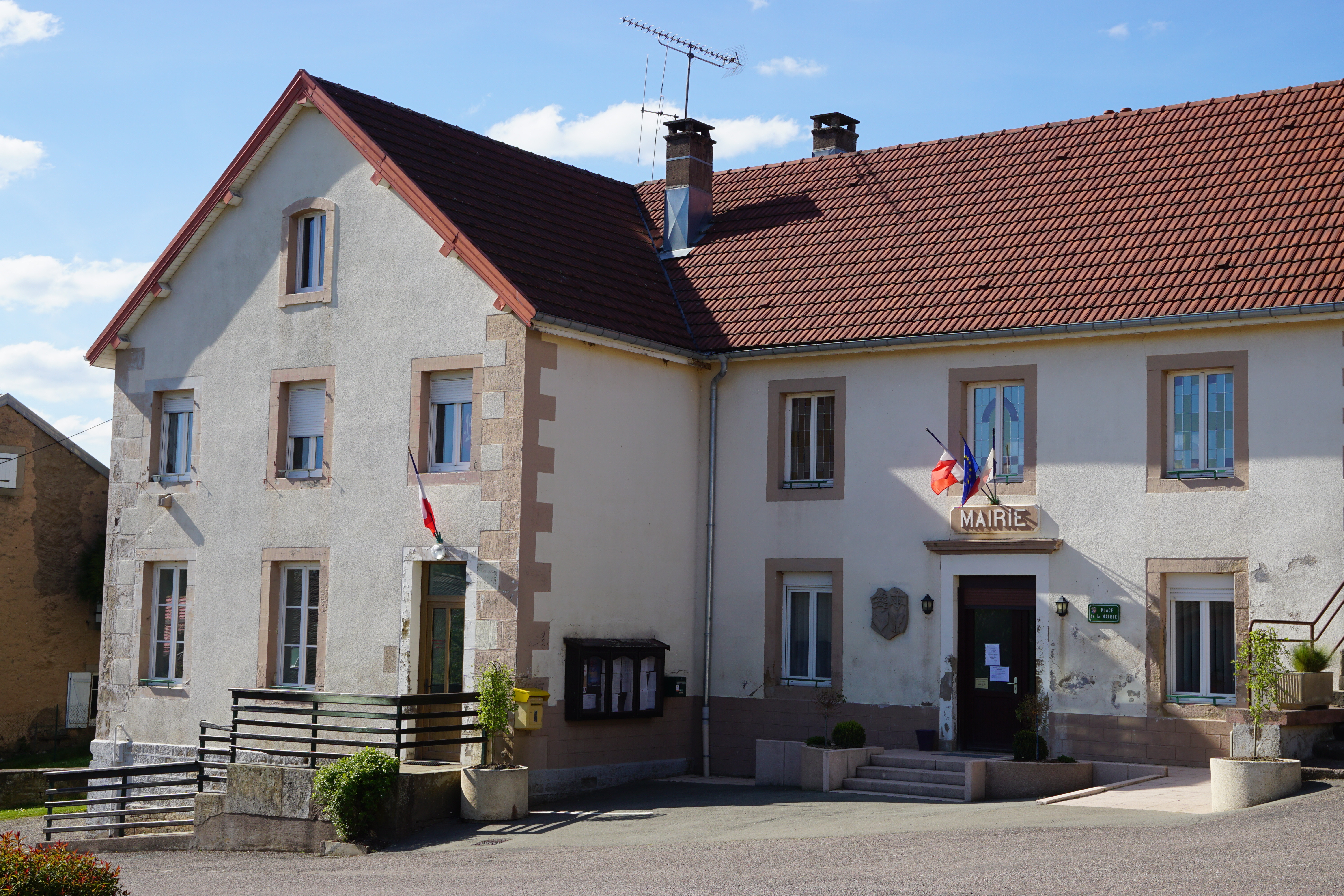 Mairie et temple protestant de Frédéric-Fontaine.